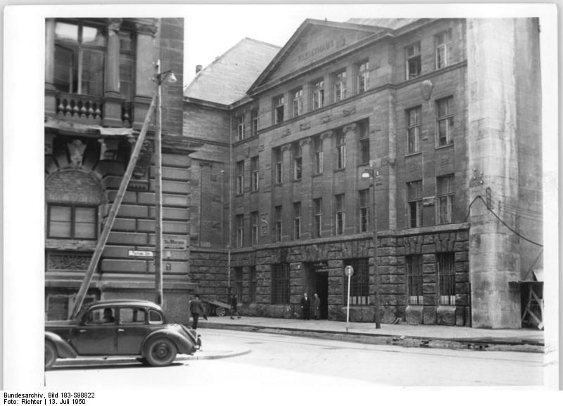 Gedenkstätten berühmter Männer in Berlin In der Mauerstrasse 53, wo sich heute das Hauptamt für Volksbildung des demokratischen Magistrats befindet, wohnte der Dichter Heinrich von Kleist vom Herbst des Jahres 1809 bis zu seinem Tode am 21. November 1811. Aufn:Illus-Richter 9-13.7.50